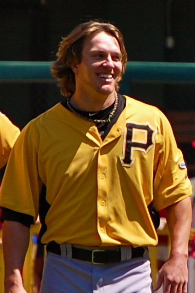 Daniel McCutchen